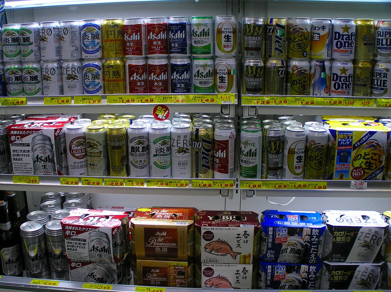 ディスカウントストアに並ぶ缶ビール